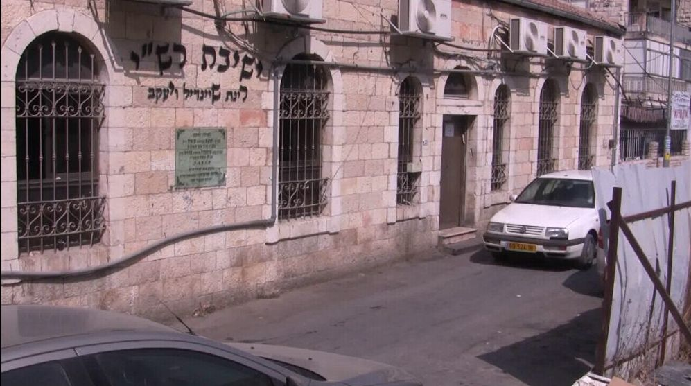 ישיבת רש"י ירושלים